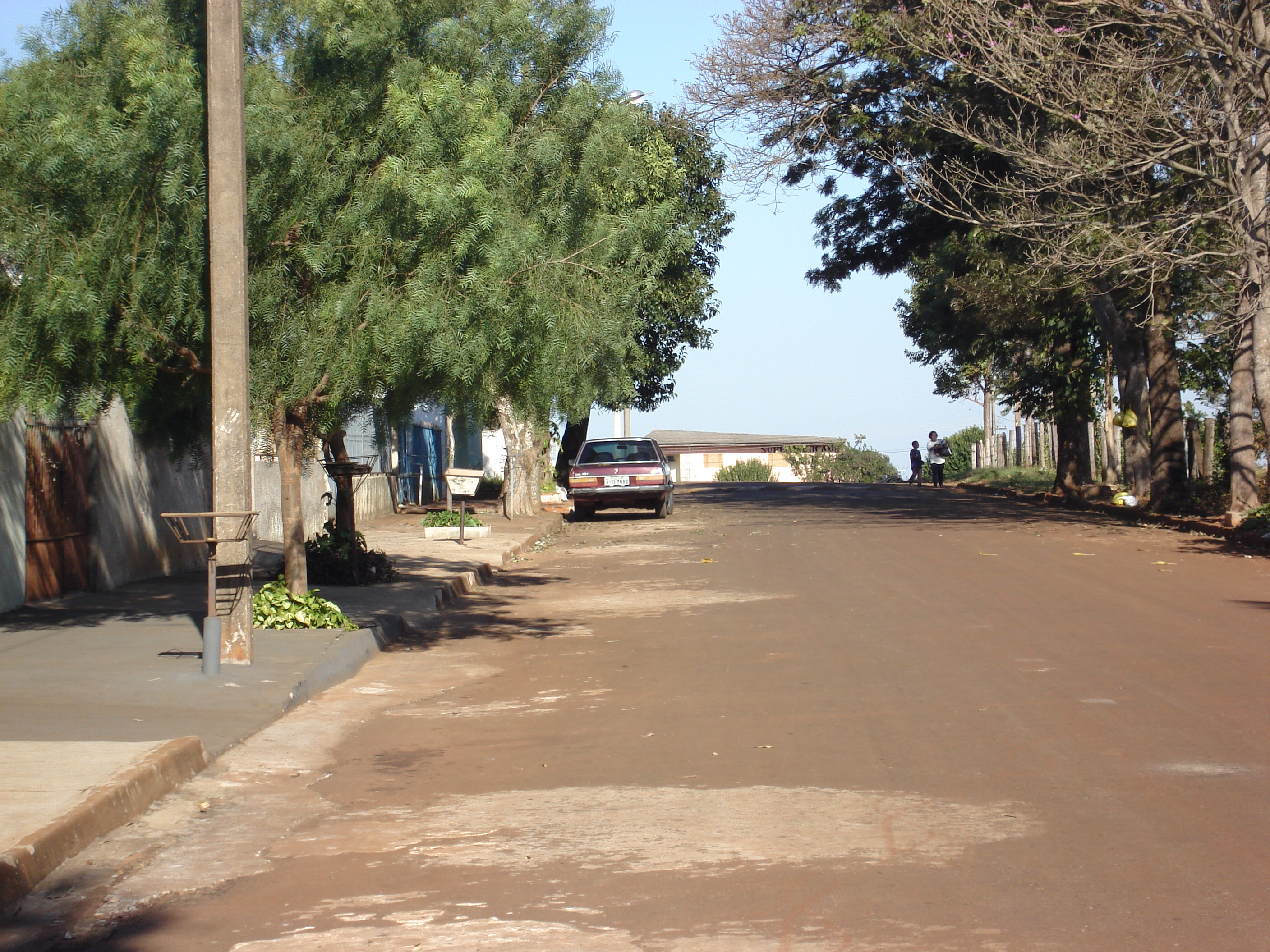 Rua Pedro Khater, Conjunto Avelino Antônio Vieira, Londrina-PR